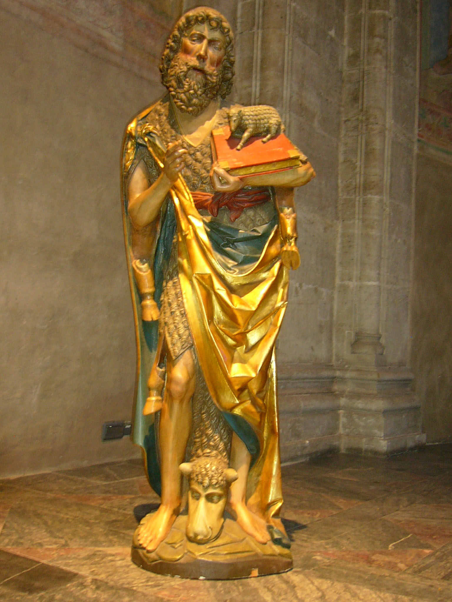 Johannes des Täufer im Braunschweiger Dom (Holz?)